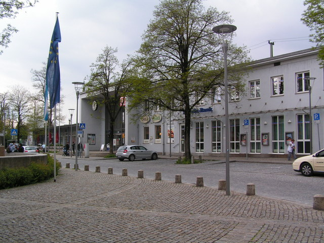 Bahnhof Traunstein, near to Traunstein, Deutschland (Zone 33).